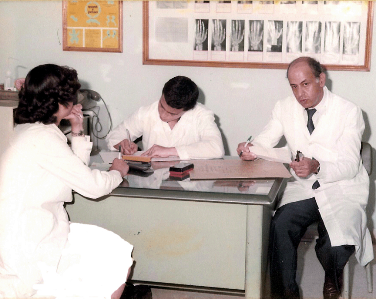 C'est le grand professeur Mohamed Taieb El Kassab, éminent orthopédiste tunisien, en consultation dans son service à Ksar Saïd.